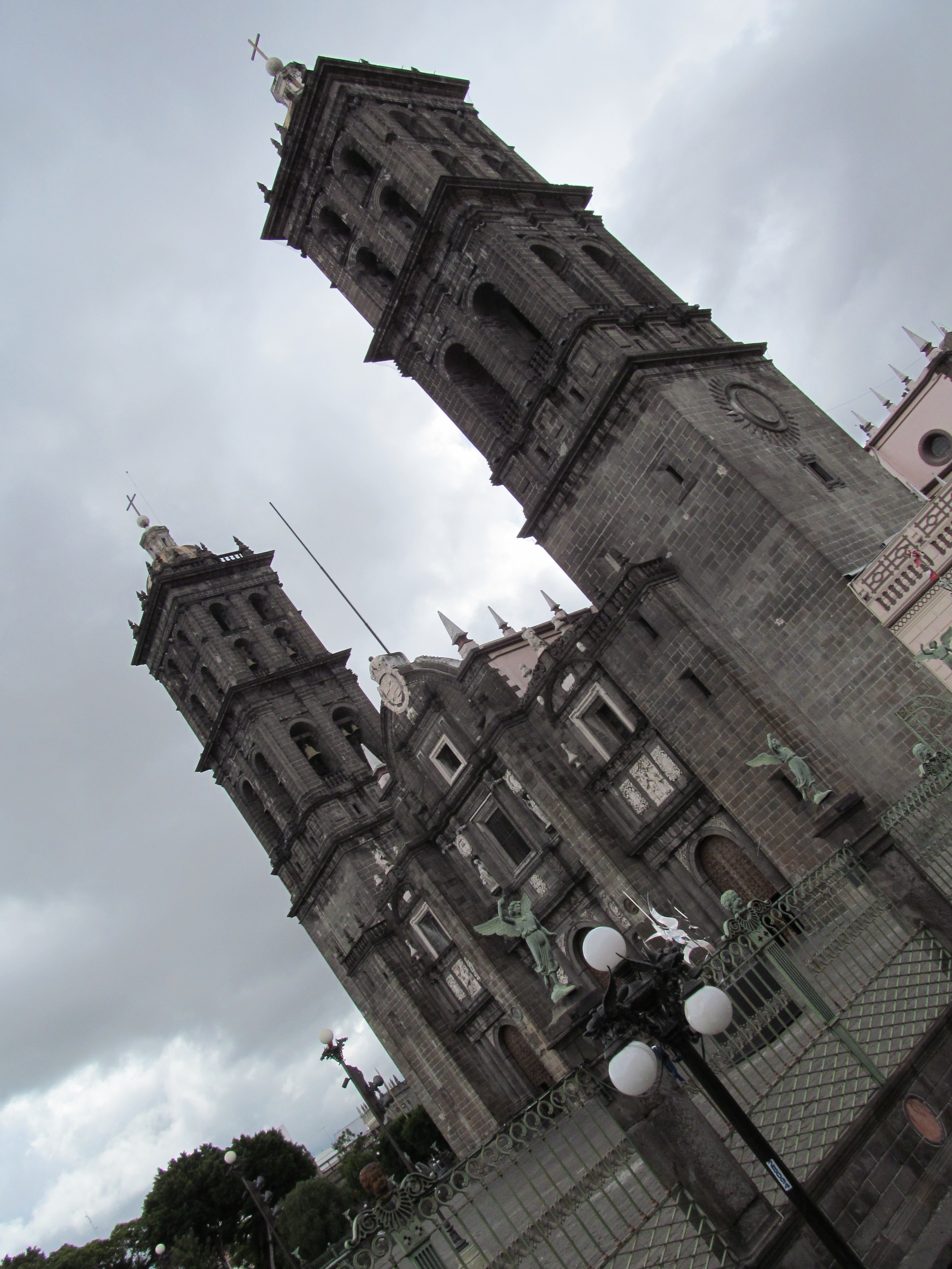 Catedral de Puebla.